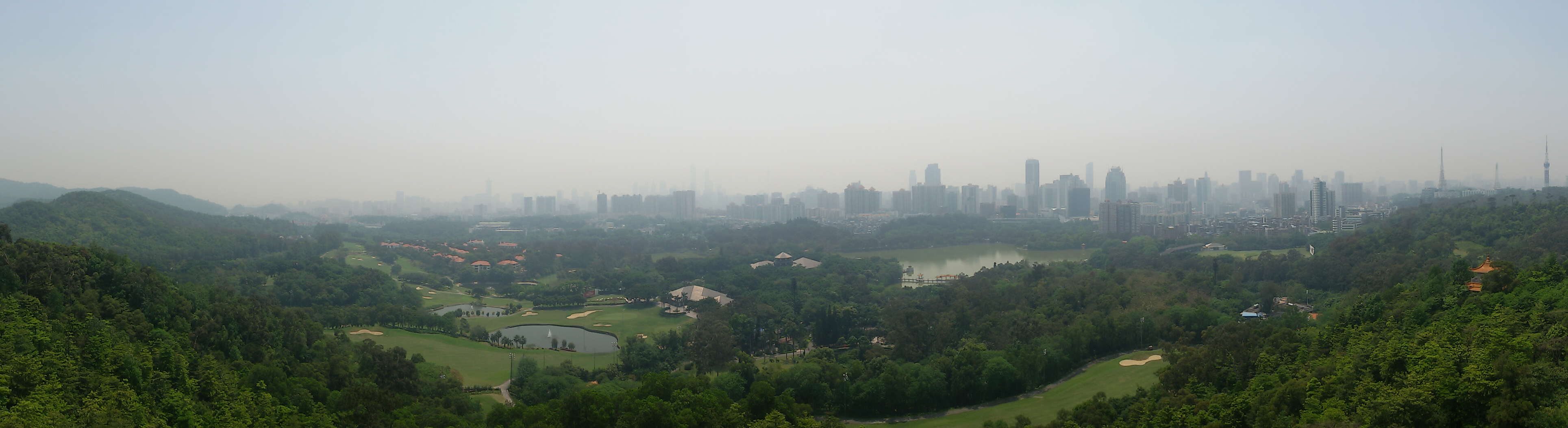 粵語: 南邊嘅廣州全景（喺鴻鵠樓嗰度影）